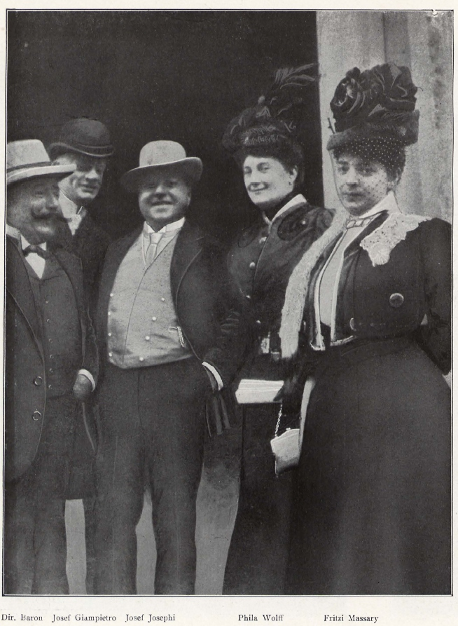 Josef Josephi, eigentlich Josef Ichhäuser (1852-1920), österreichischer Sänger und Schauspieler mit Kollegen des Metropol-Theaters in Berlin vor einer Probe zu der Revue "Der Teufel lacht dazu" von Julius Freund, 1906.